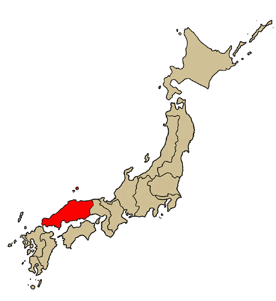 Mappa della diocesi cattolica di Hiroshima, in Giappone. Lavoro personale.